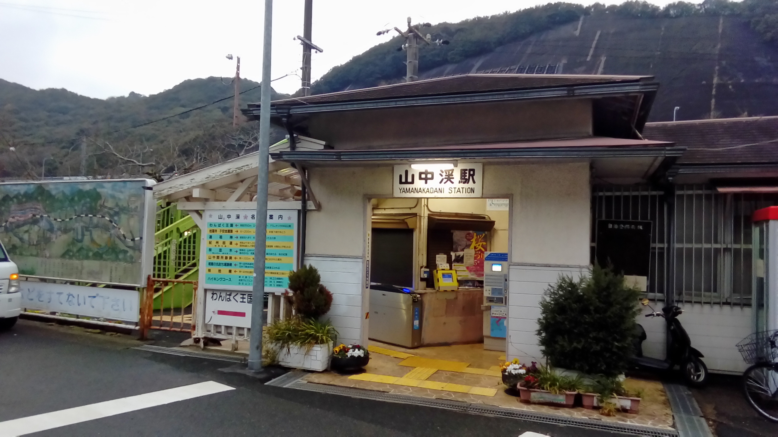 山中渓駅（大阪府阪南市）